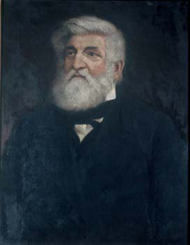 Теодор Людвиг Вильгельм фон Бишоф